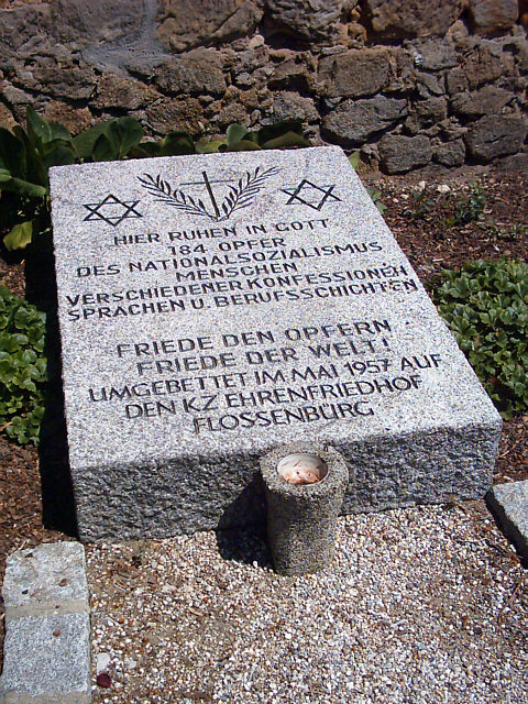 Schwarzenfeld, (Oberpfalz): Gedenkstein für die nach Schwarzenfeld verschleppten und dort zu Tode gekommenen KZ-Häftlinge aus Flossenbürg